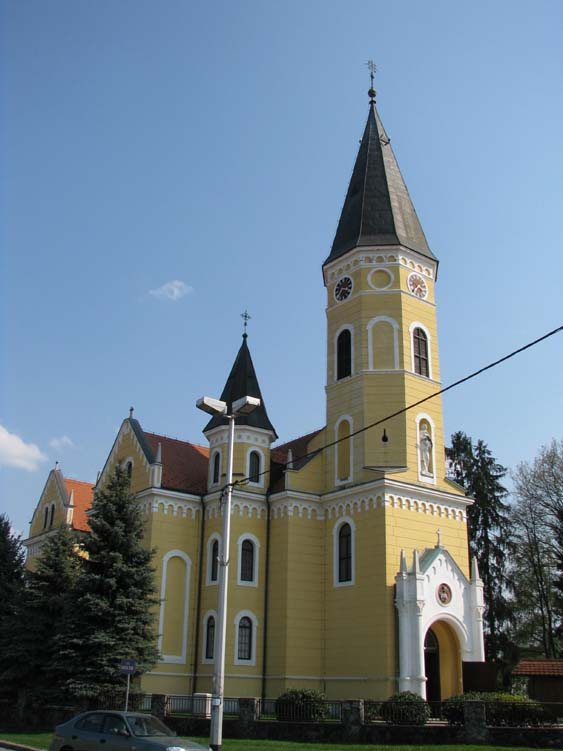 Župna crkva Navještenja BDM Velika Gorica